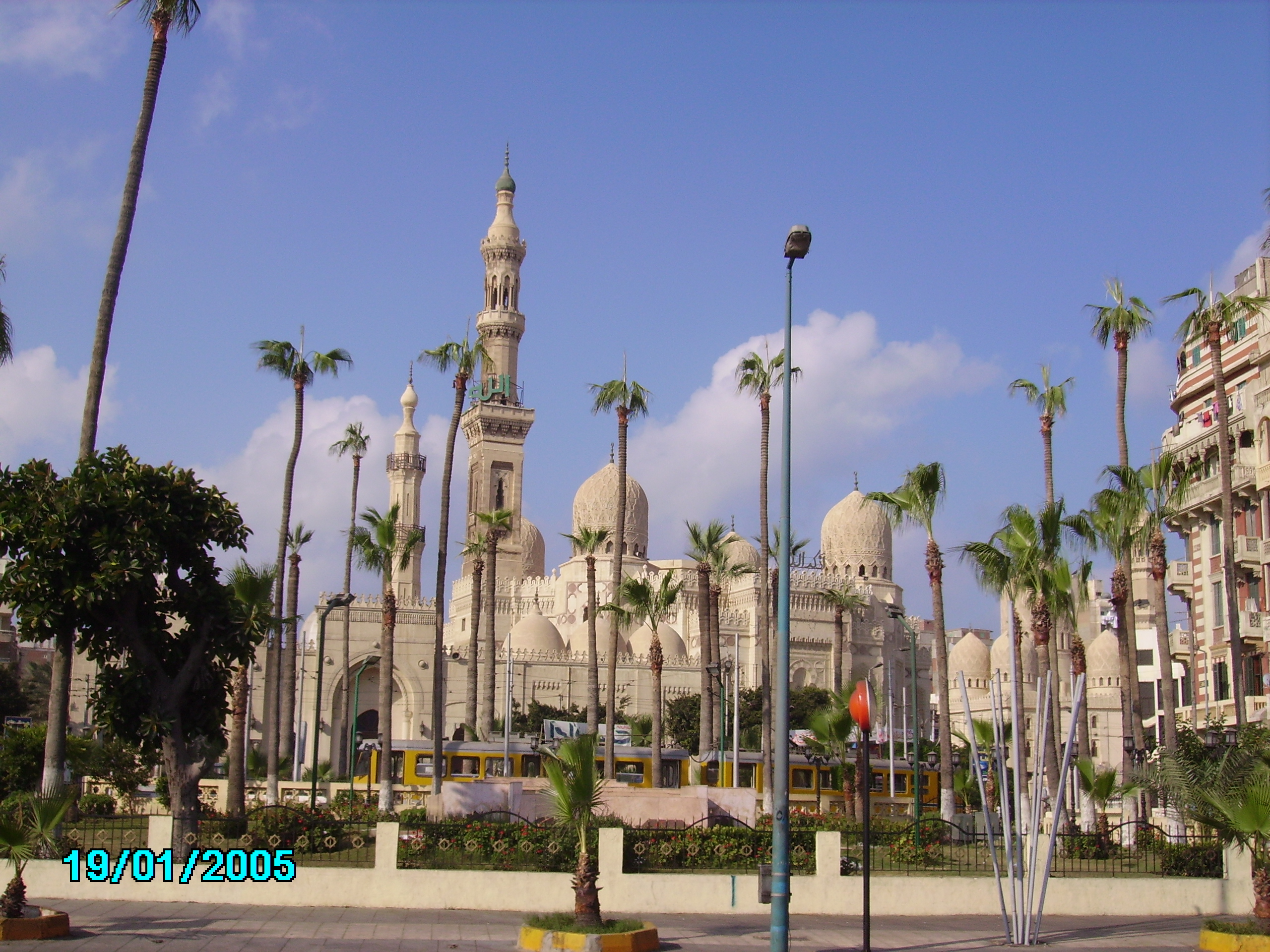 جامع المرسي أبو العباس في الأسكندرية. Runa Simi: Iskandariya Hatun mosque.